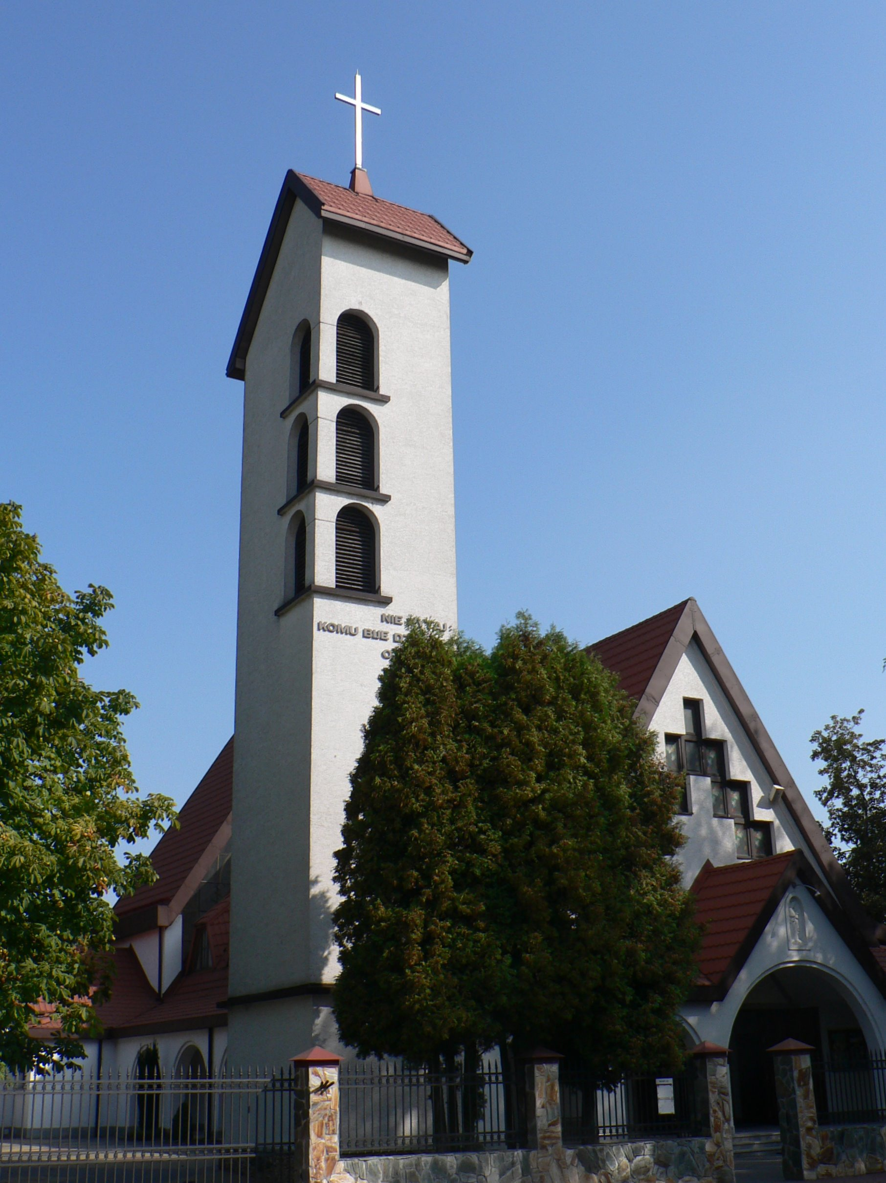 Kościół Wniebowzięcia NMP w Michałowicach